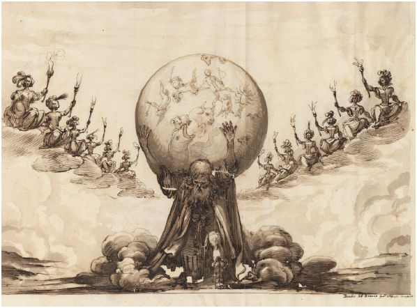 Atlas sujetando el mundo y rodeado de 12 mujeres que representan los 12 signos del zodíaco